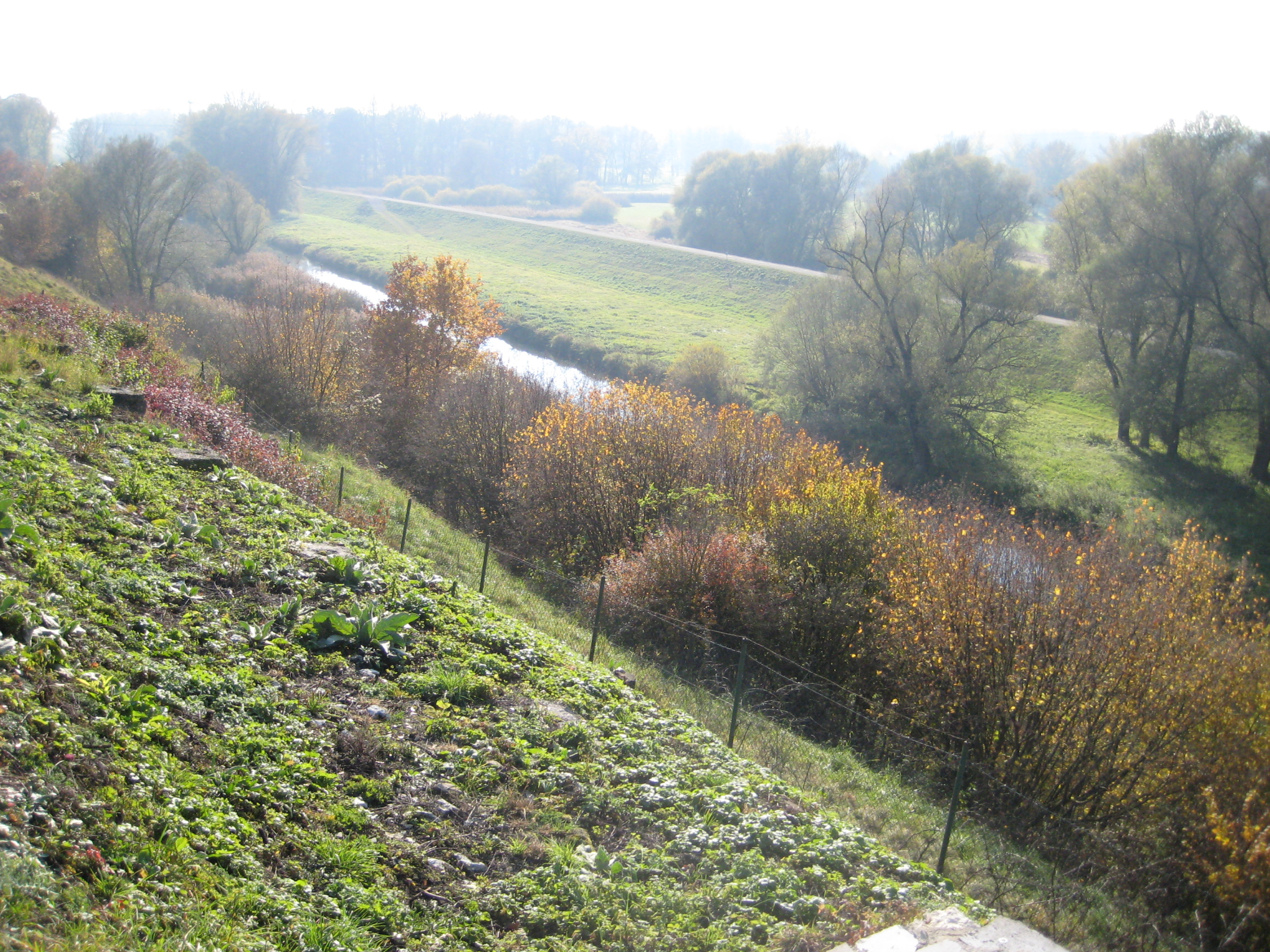 Kastell Eining: Das Donausteilufer mit dem namensgebenden Flüsschen Abens im Vordergrund